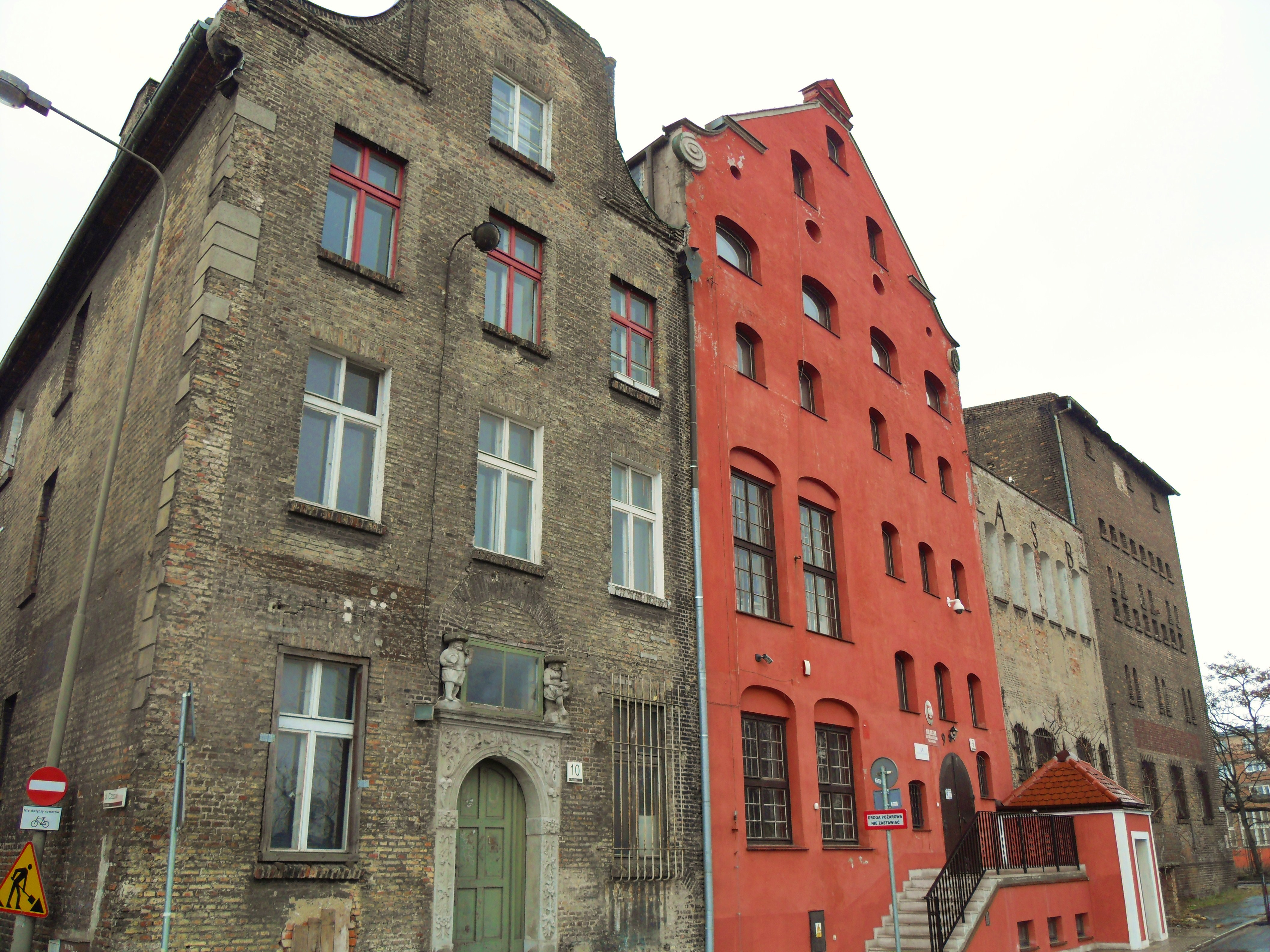 Gdańsk Zamczysko, ul. Rycerska, od lewej: 10, 9, 8 i 7.